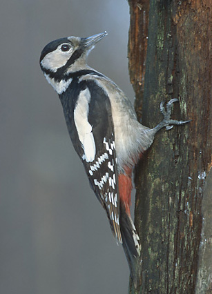 Dendrocopos major